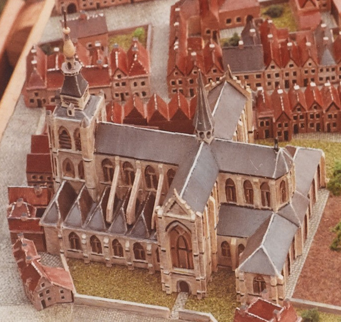 Maquette van de st Gertrudiskerk te Bergen op Zoom in de 18de eeuw. Het is een replica van de maquette in het Musée des Plans Réliëfs te Parijs.